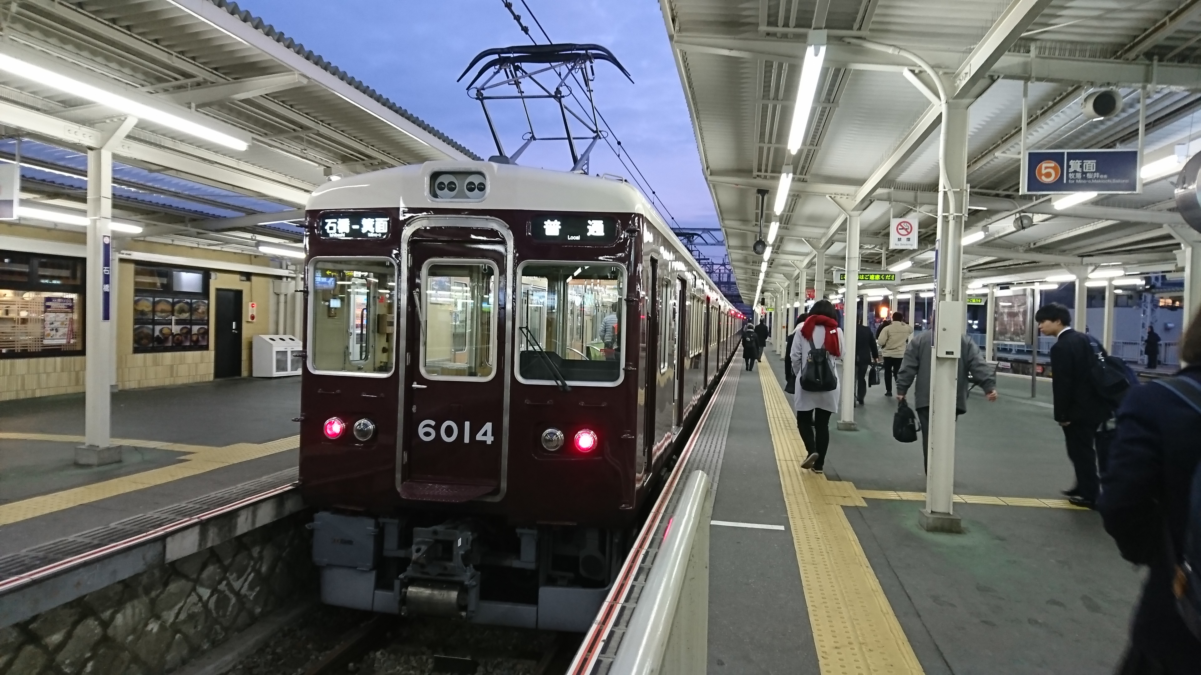 阪急6000系6014F